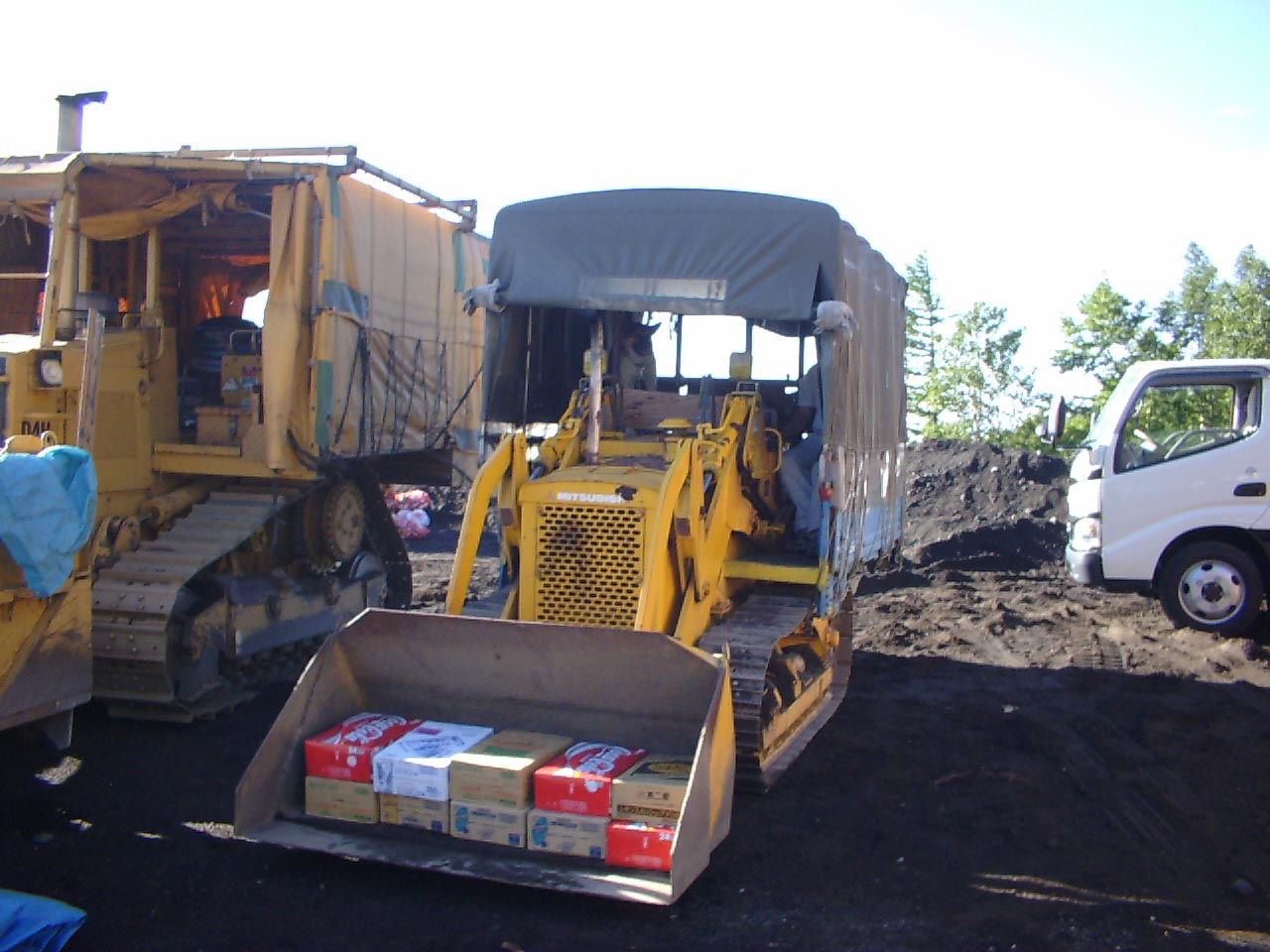 須走口の荷揚げブルドーザー